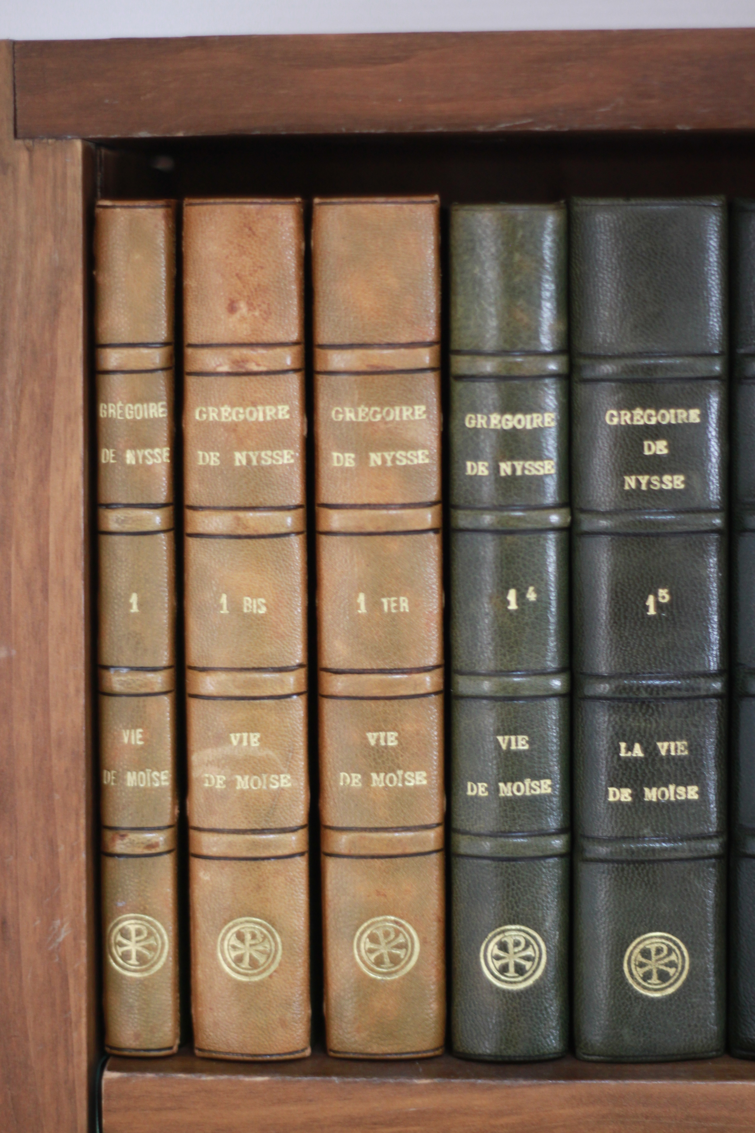 Die Ersten Werkausgaben der Sources Chrétiennes in der Bibliothek des Instituts in Lyon.